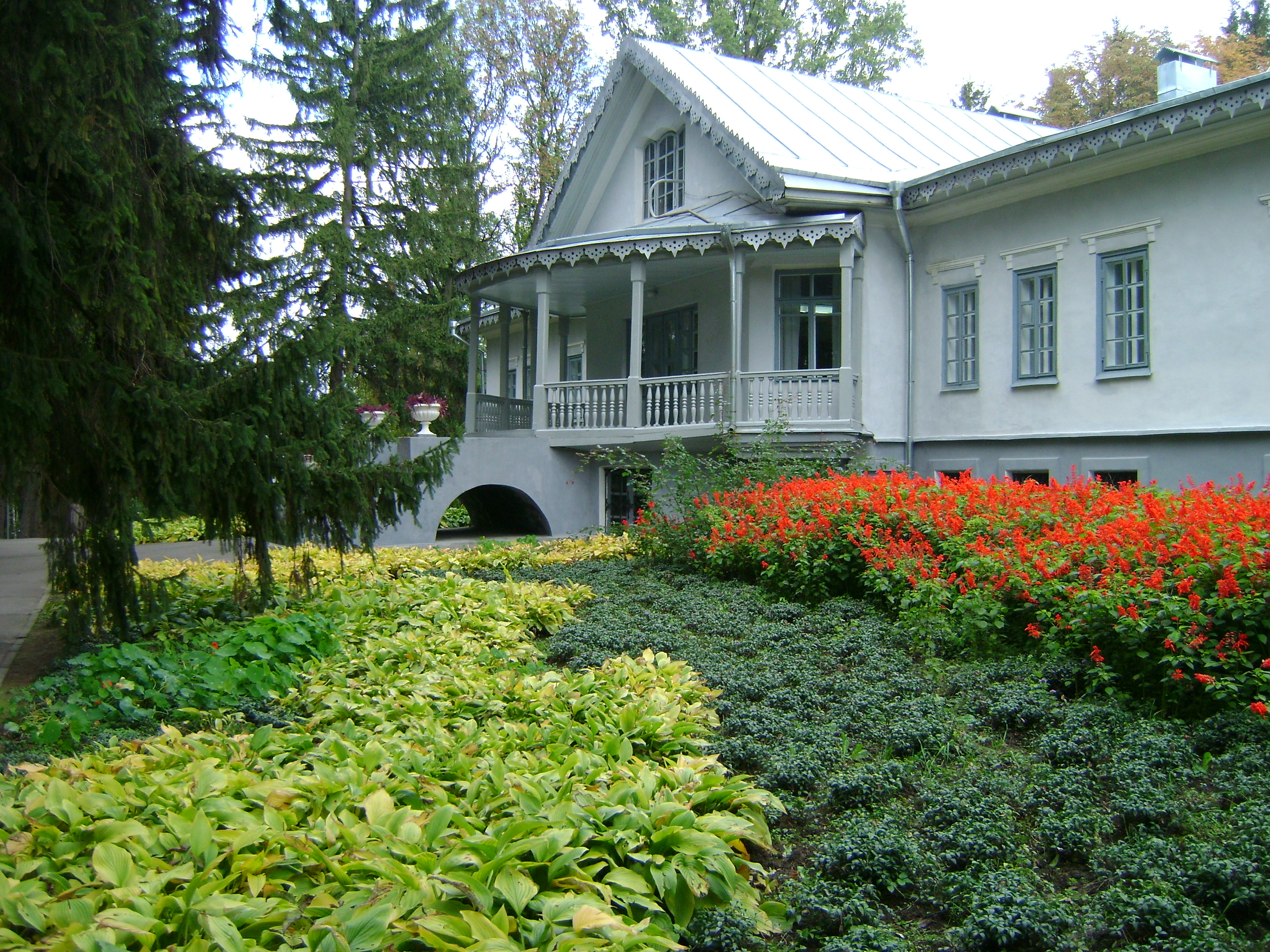 Музей-садиба М. І. Пирогова, м. Вінниця, вул. Пирогова, 155